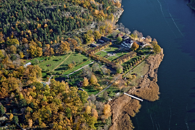 Mot O. Beatelunds herrgård ses mitt i bilden. Motiv: Beatelund Nyckelord: Flygbilder, Riksintressen Kategori: Kust- och skärgårdsmiljö, Herrgårds-/slottslandskap Mot O. Beatelunds herrgård ses mitt i bilden.